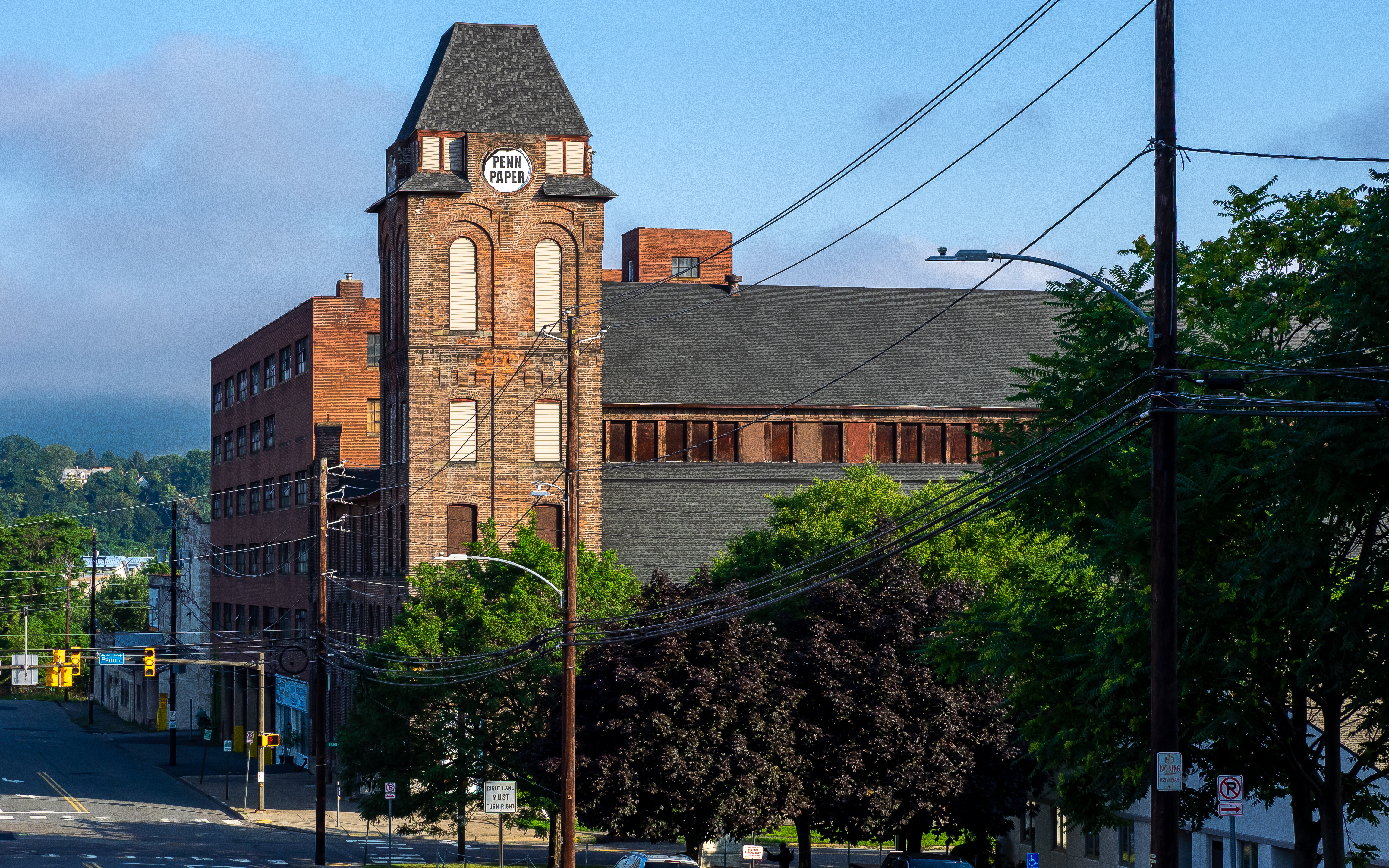 Scranton, PA